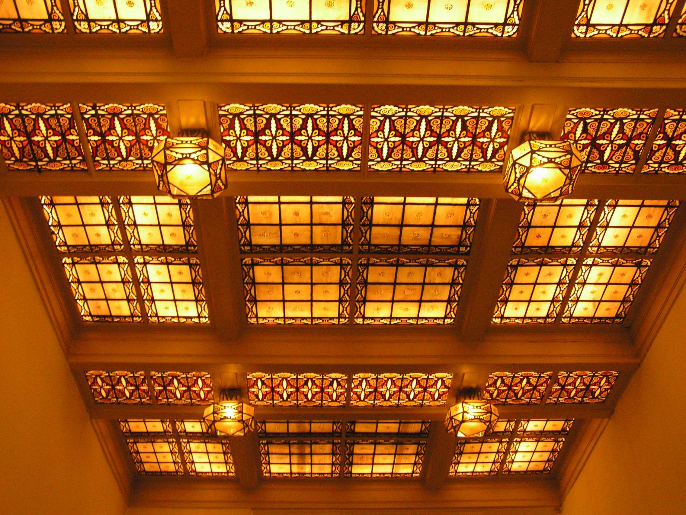 Glas-in-lood plafond (Art deco) in het hoofdgebouw van Croda (voormalige Stearine kaarsenfabriek) te Gouda. Het gebrandschilderd glas-in-lood onder het bovenlicht en voor de lichtbakken tegen de wanden zijn ontworpen door glazenier Jan Schouten.